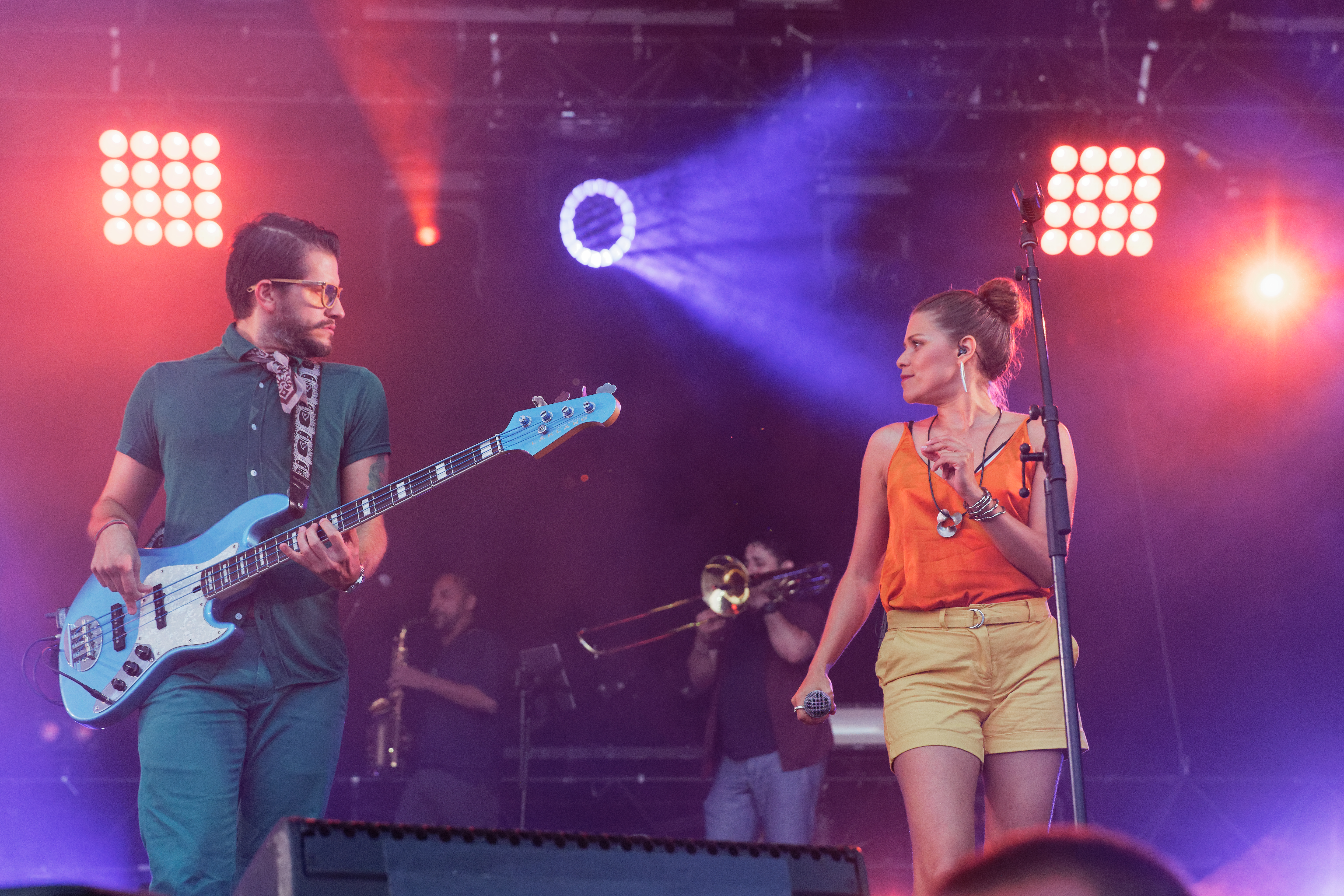 Puerto Candelaria en concert sur la scène Landaoudec lors du festival du Bout du Monde 2018 à Crozon dans le Finistère (France).